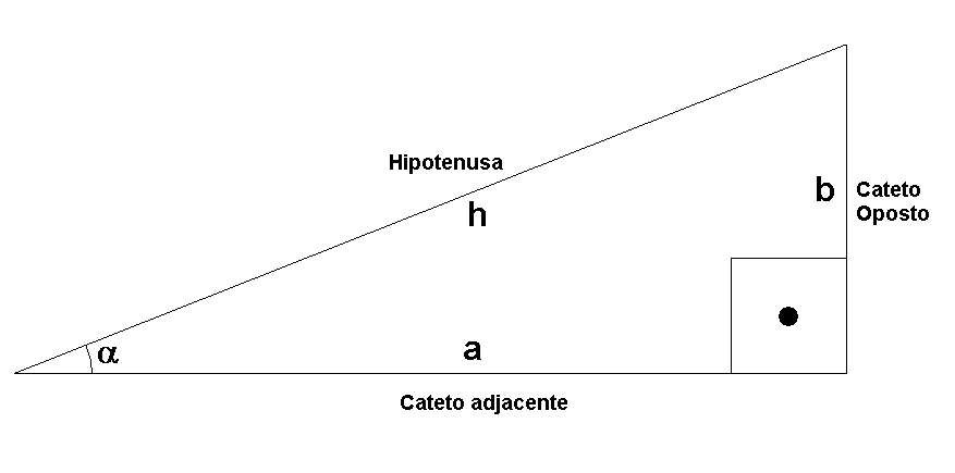 Triângulo retângulo